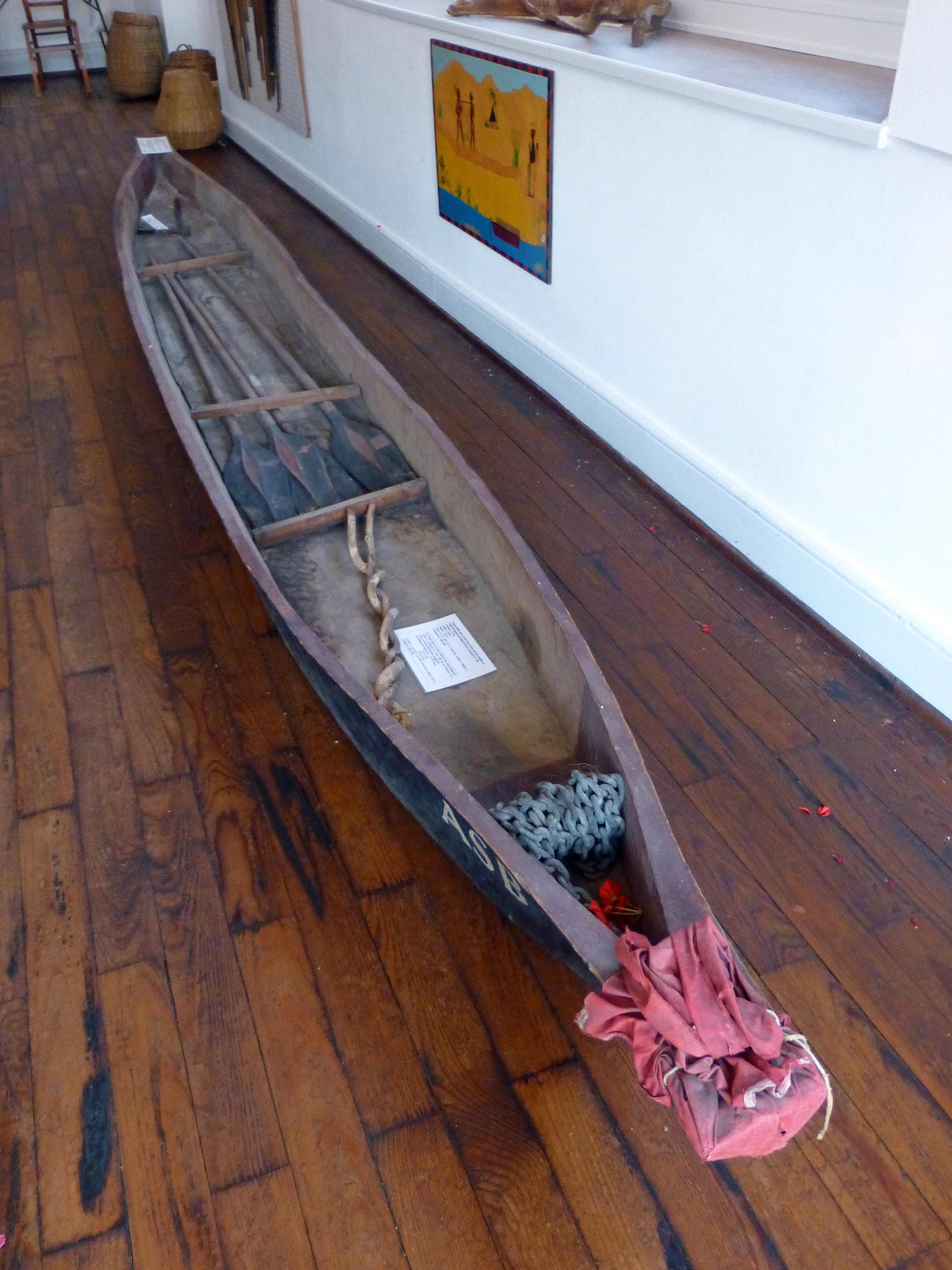 Musée africain de Gunsbach (Haut-Rhin) : pirogue taillée dans un seul tronc d'arbre, par des malades du village des lépreux de l'hôpital Albert Schweitzer de Lambaréné en 1962. Longueur : 5,10 m Largeur : 0,55 m Hauteur : 0,25 m La pirogue a été reçue en juin 2007 de M. Hans-Udo Juettner, médecin à Lambaréné en 1962-1963.